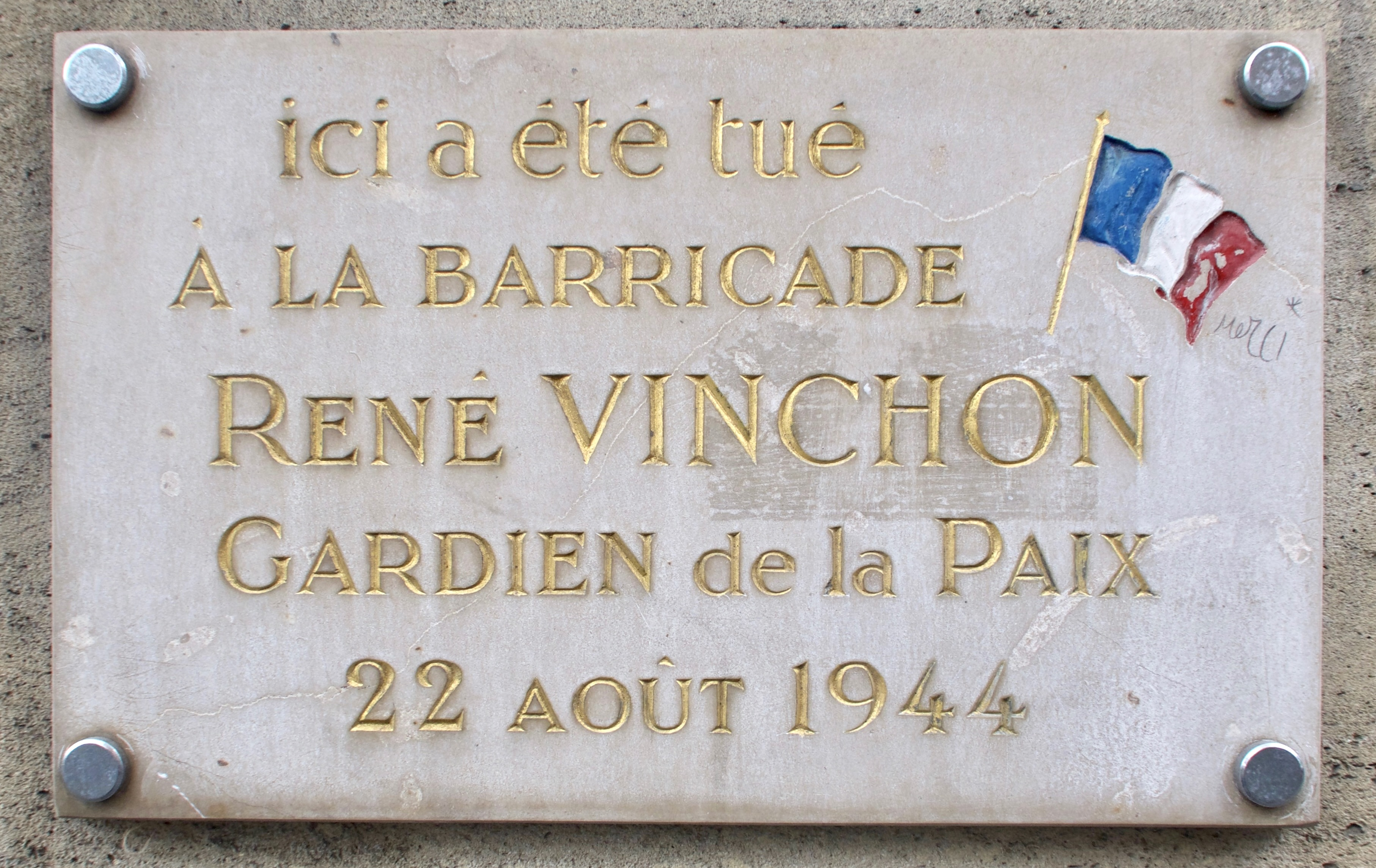 Plaque en hommage au résistant René Vinchon, n°27 rue Saint-Jacques (Paris, 5e).